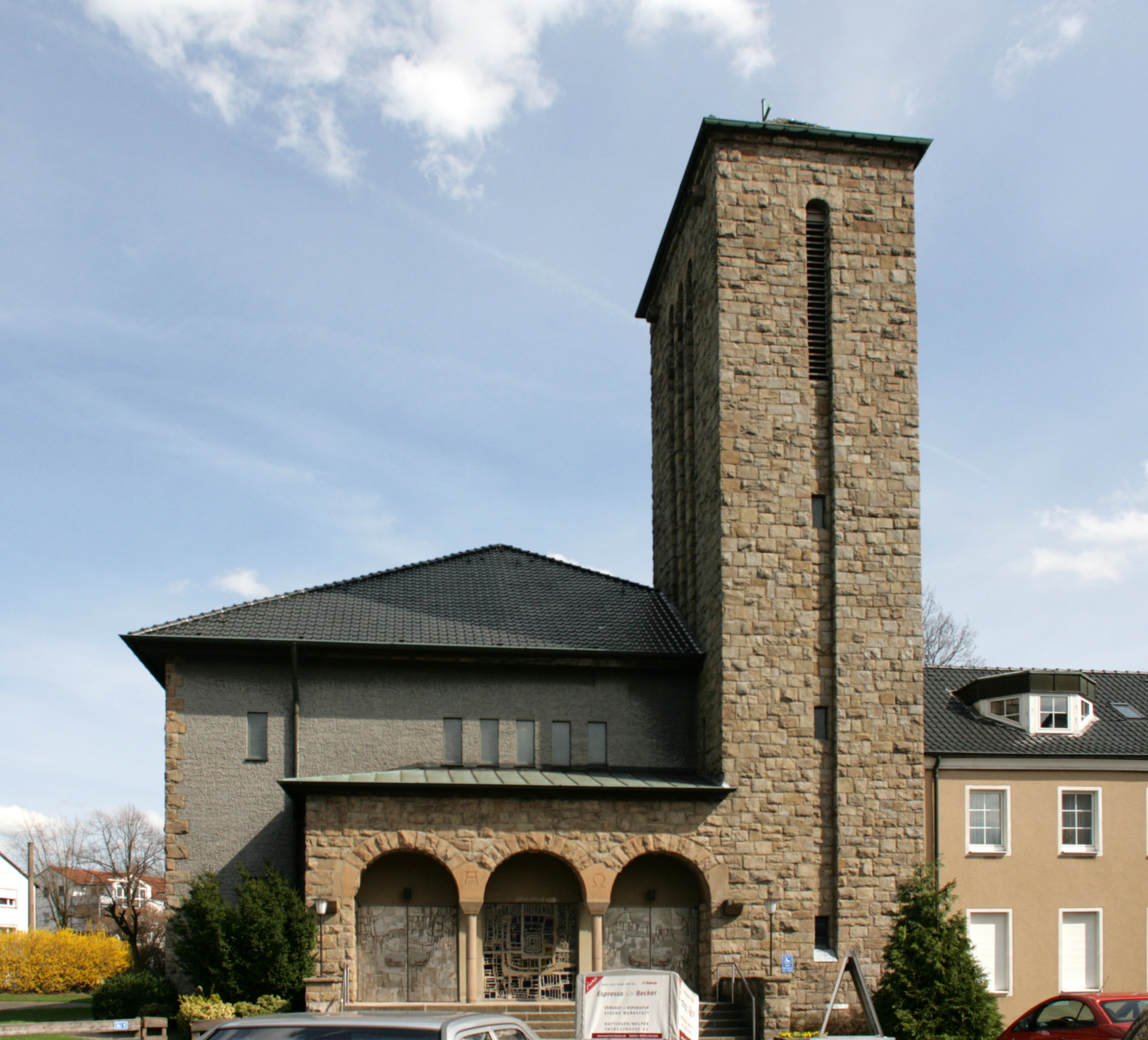 St. Joseph im Dreieck Thingstraße/Sankt-Josef-Straße/Marxstraße in Hattingen-Welper